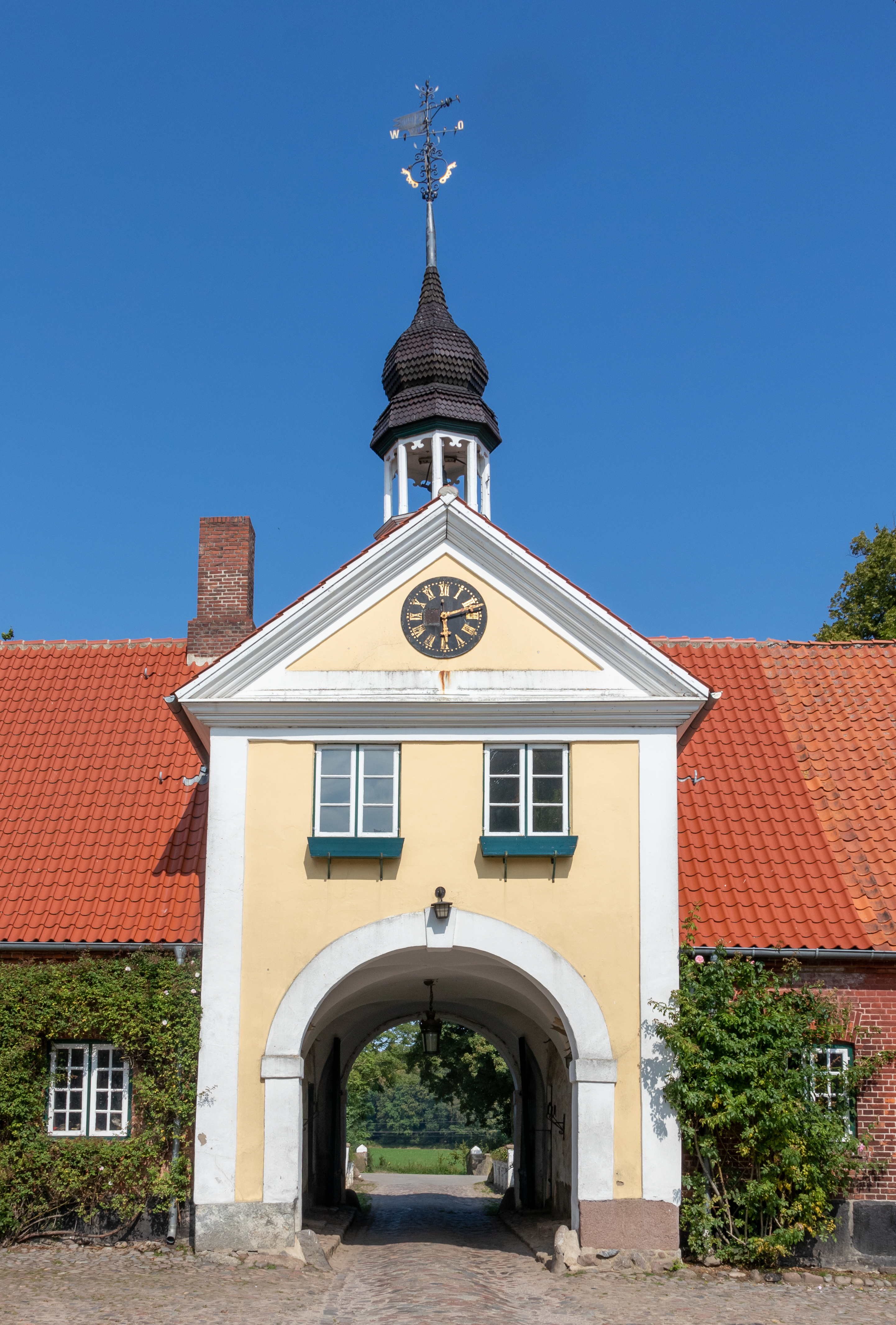 Gut Damp – Torhaus